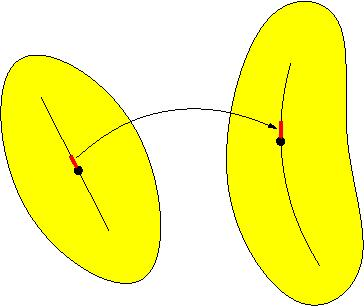 Deformation